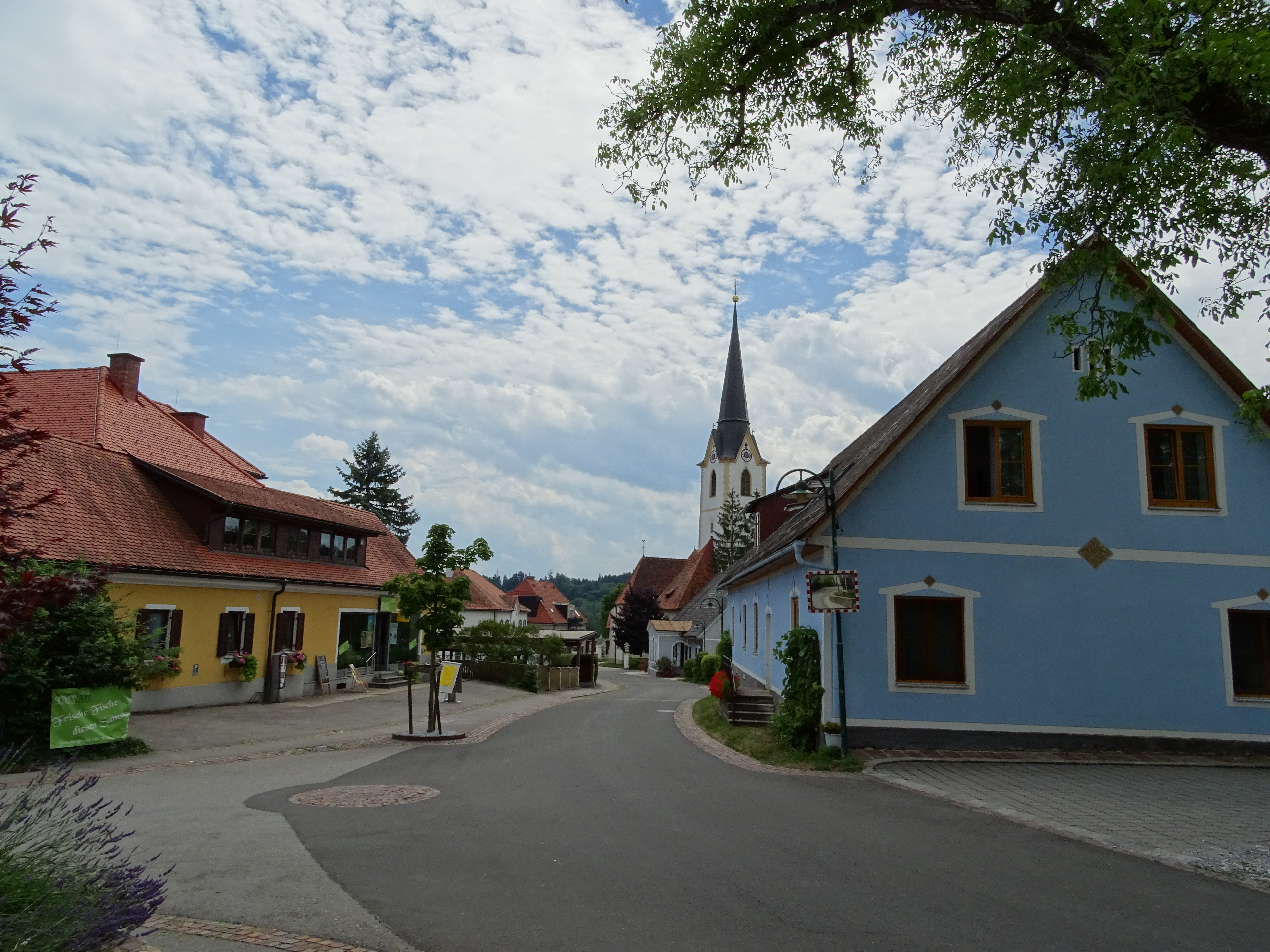 Blick von Nordosten auf die Ortsdurchfahrt von Hitzendorf